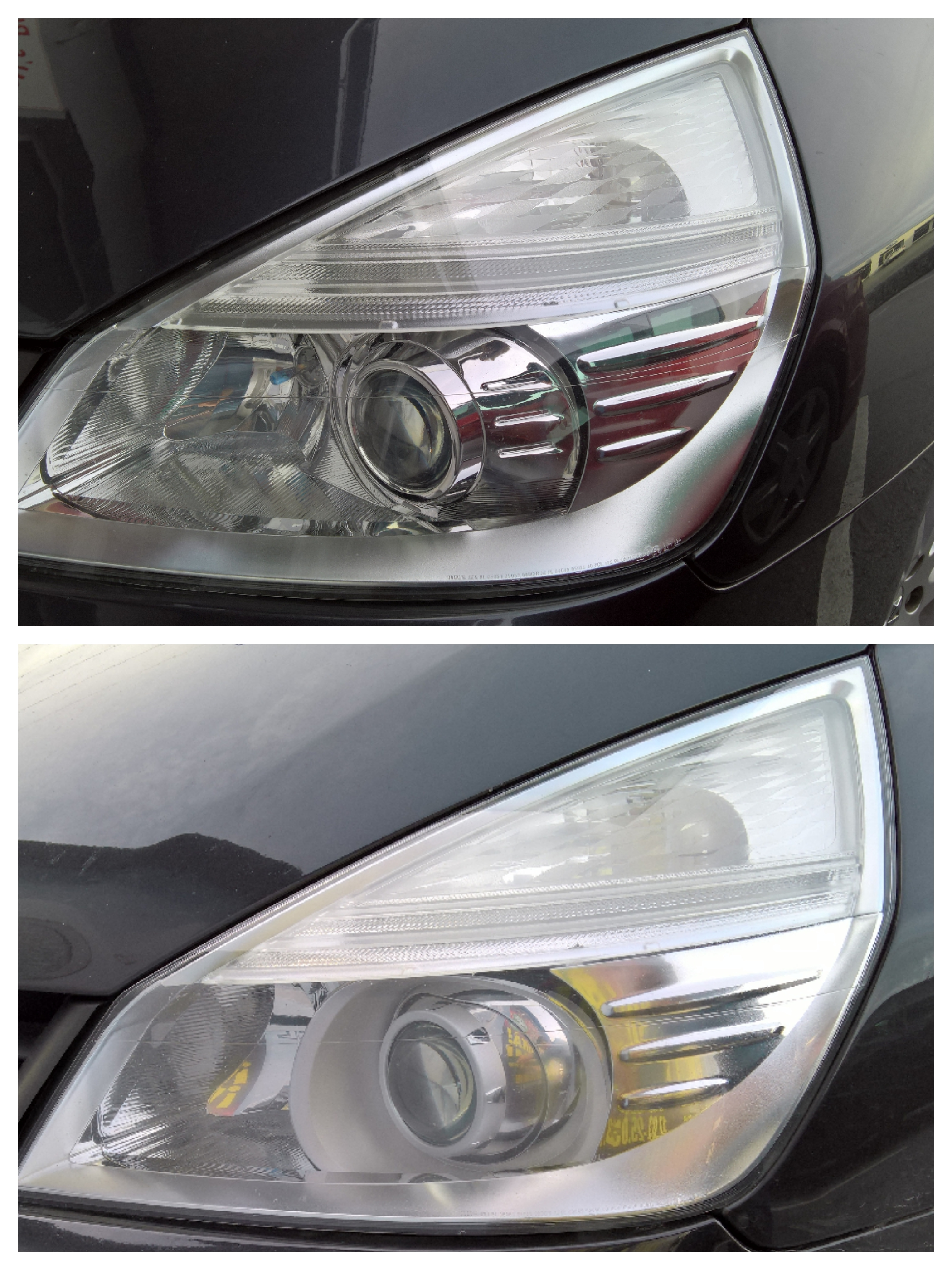 Hier sieht man die Unterschiede beim Scheinwerfer. Oben ohne Kurvenlicht und unten mit Aufpreis pflichtigem Kurvenlicht.